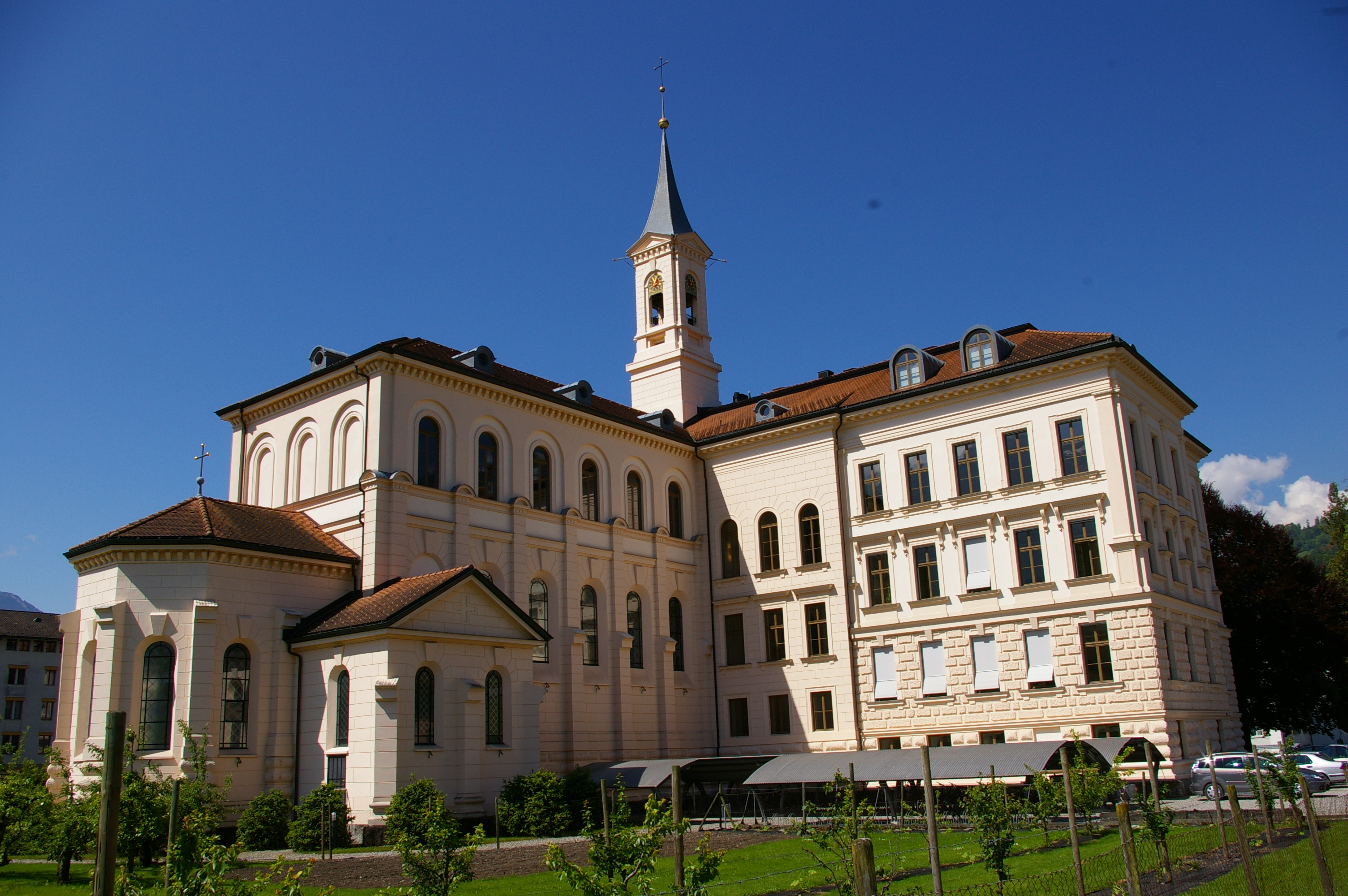 altes Unterrichtsgebäude der Kantonsschule Obwalden. Ist immer noch in Benutzung